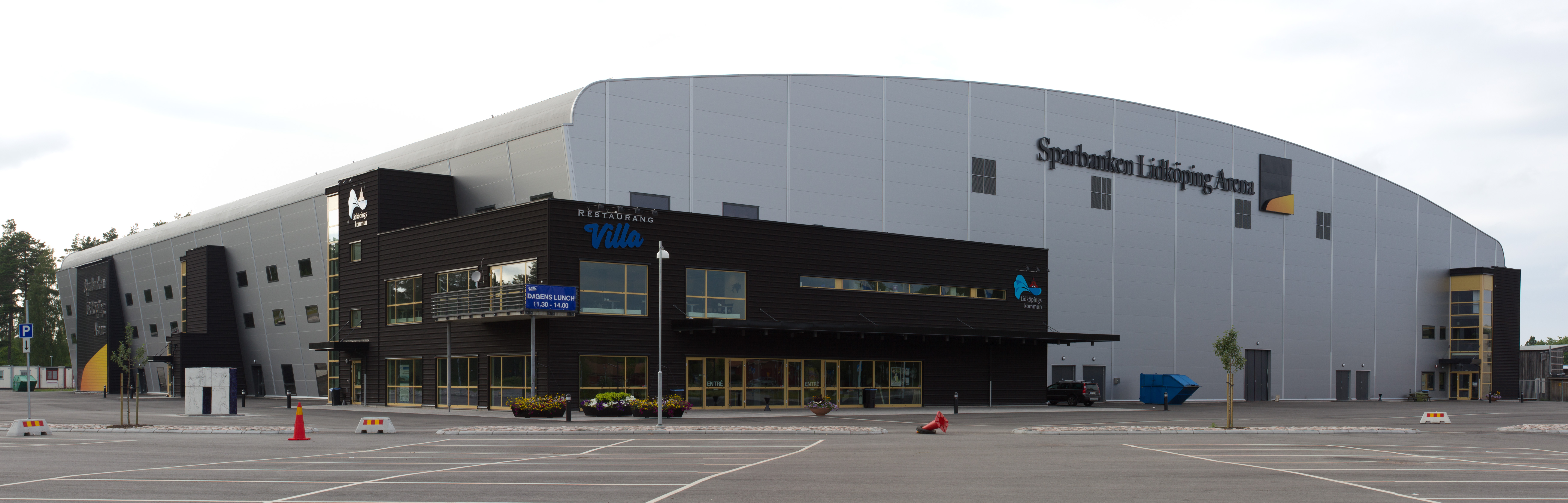 Sparbanken Lidköping Arena i Lidköping sedd från sydöst. This image was created with Hugin.